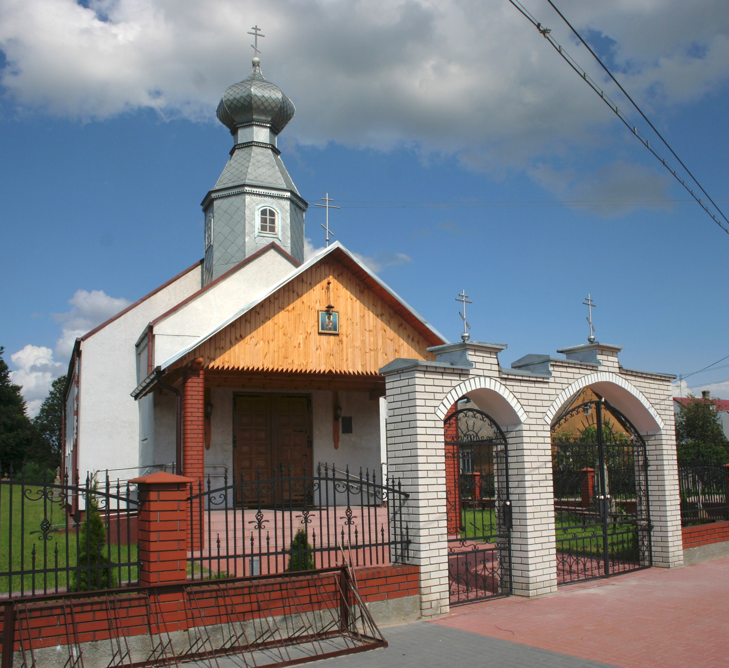 Cerkiew św. Barbary w Kuzawie.